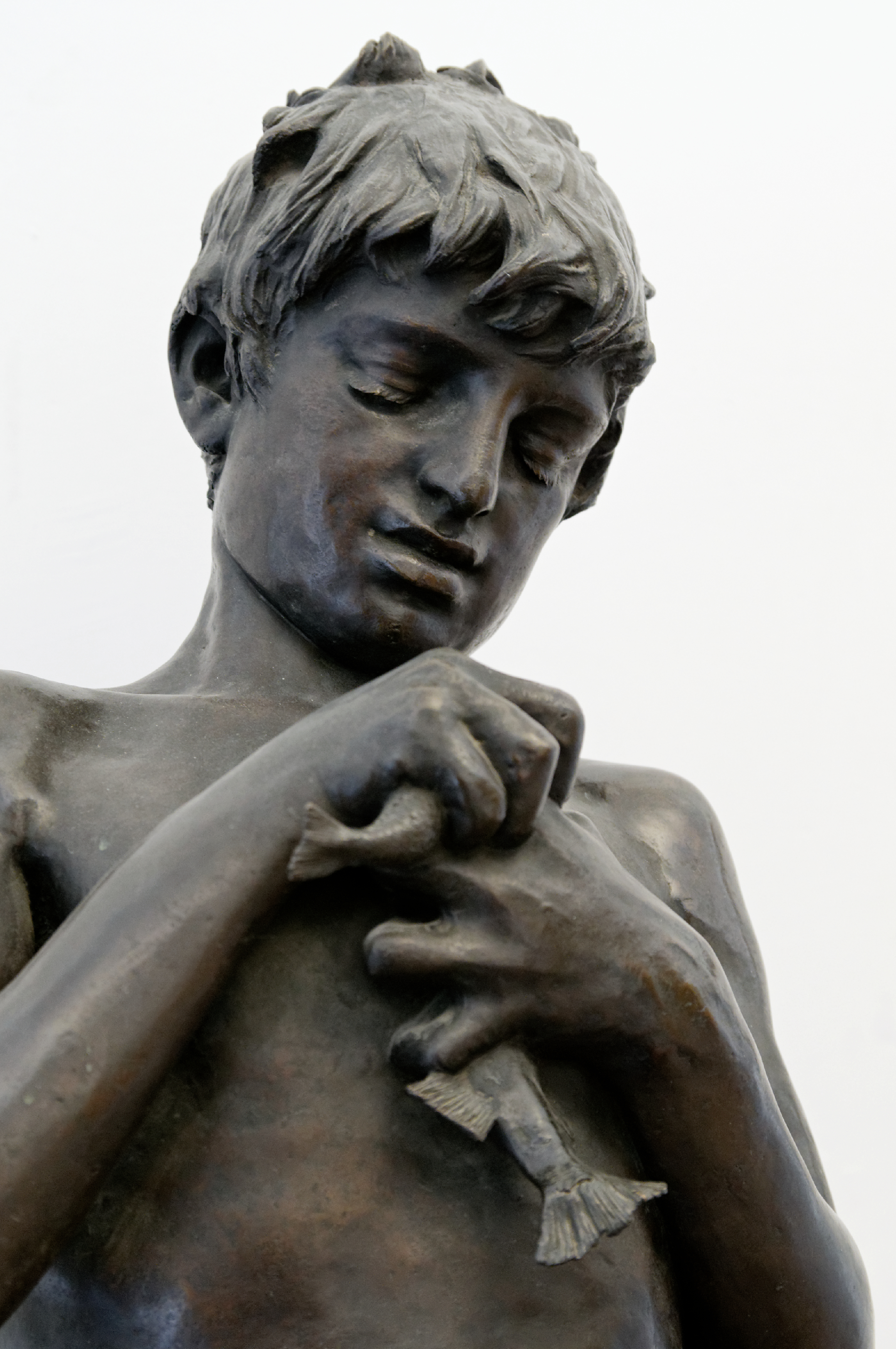 Pescatore Fisherboy (detail)